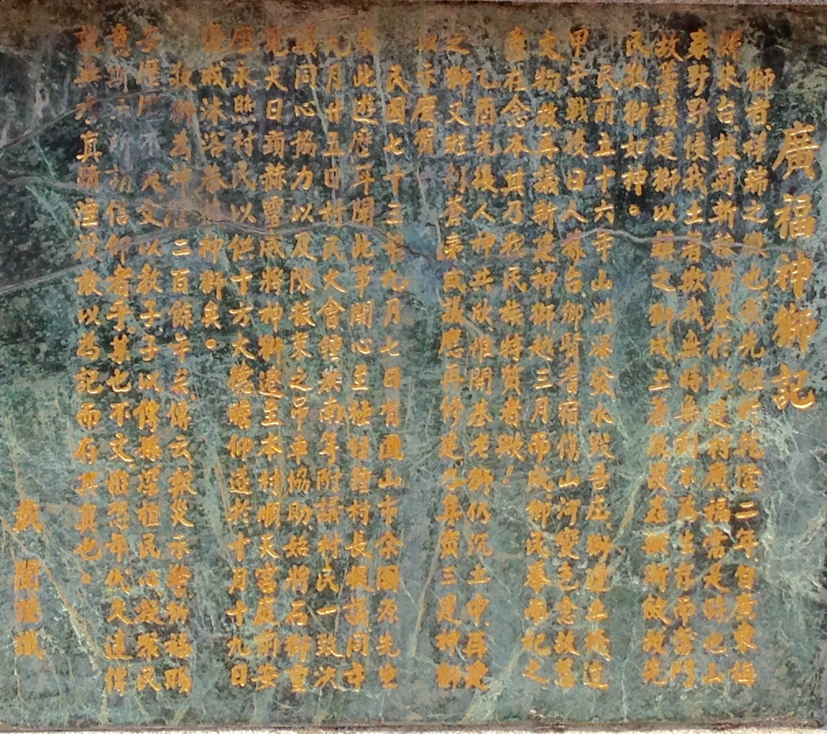 中文（台灣）: 廣福石獅記